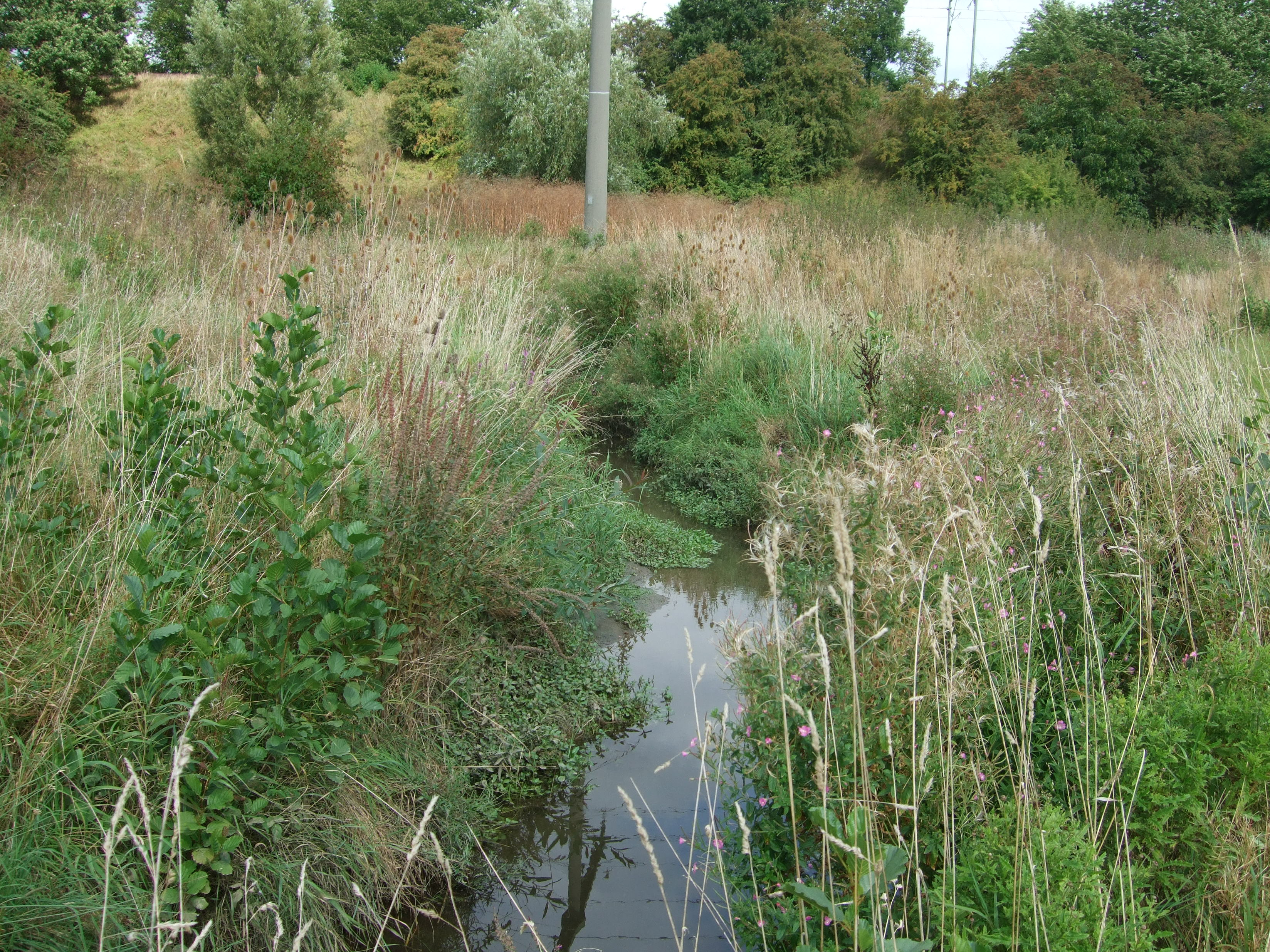 Der Strassbach bei Friedberg